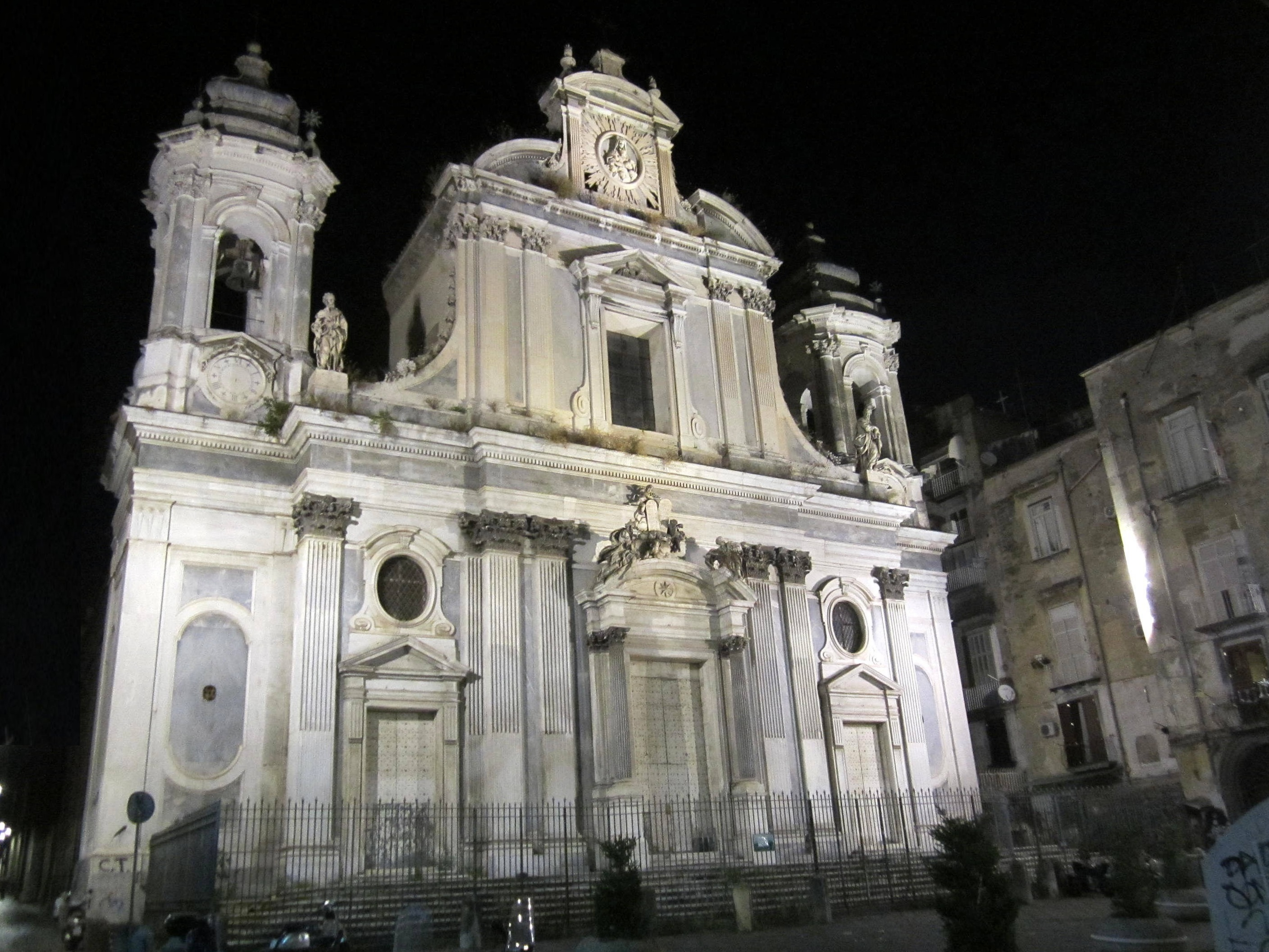 Chiesa dei Girolamini o San Filippo Neri a Napoli